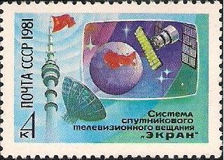 Почтовая марка СССР 1981 г. № 5239. Cbcntvf cgenybrjdjq cdzpb